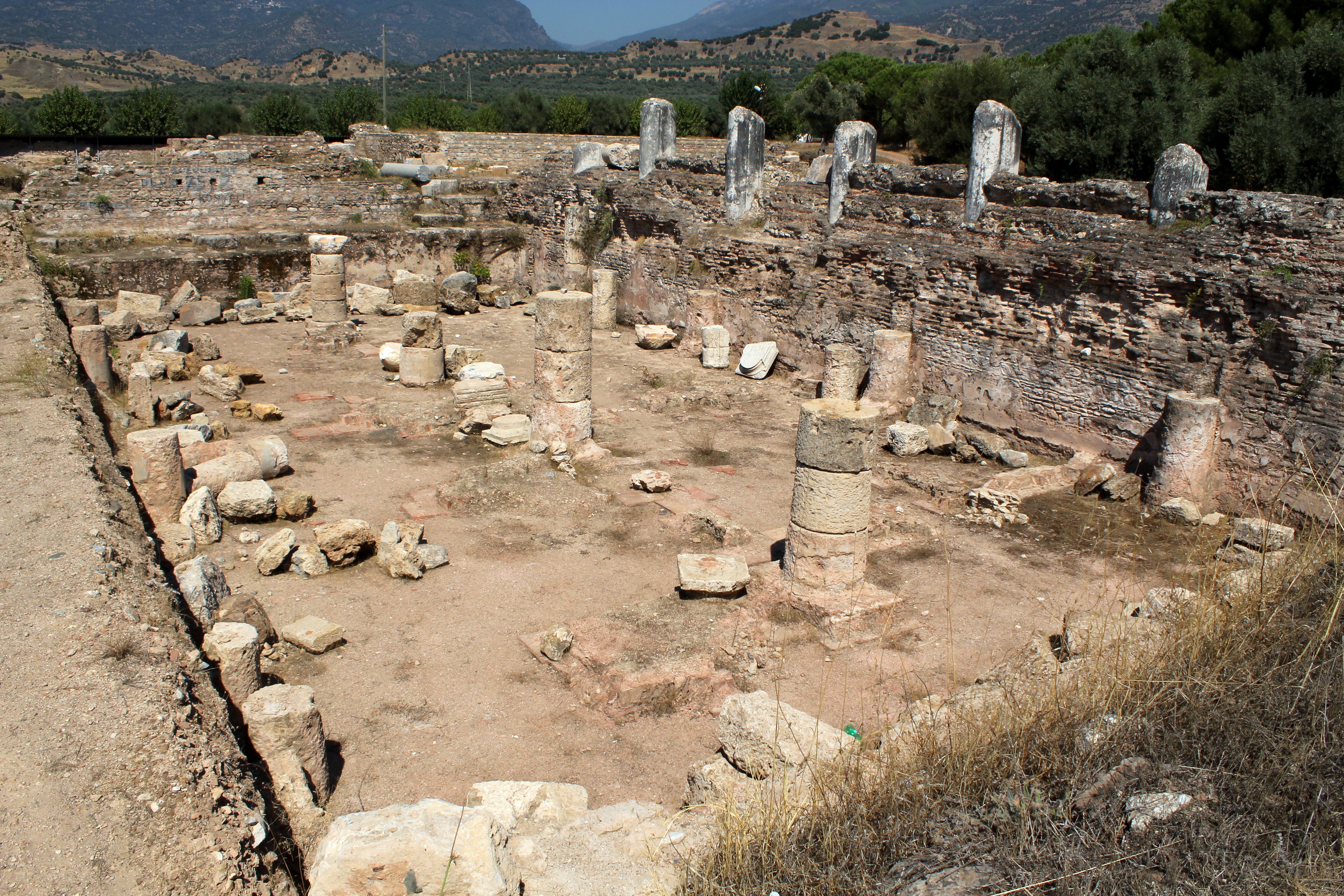 Teil des Gymnasiumskomplexes im antiken Tralles bei Aydın, Westtürkei